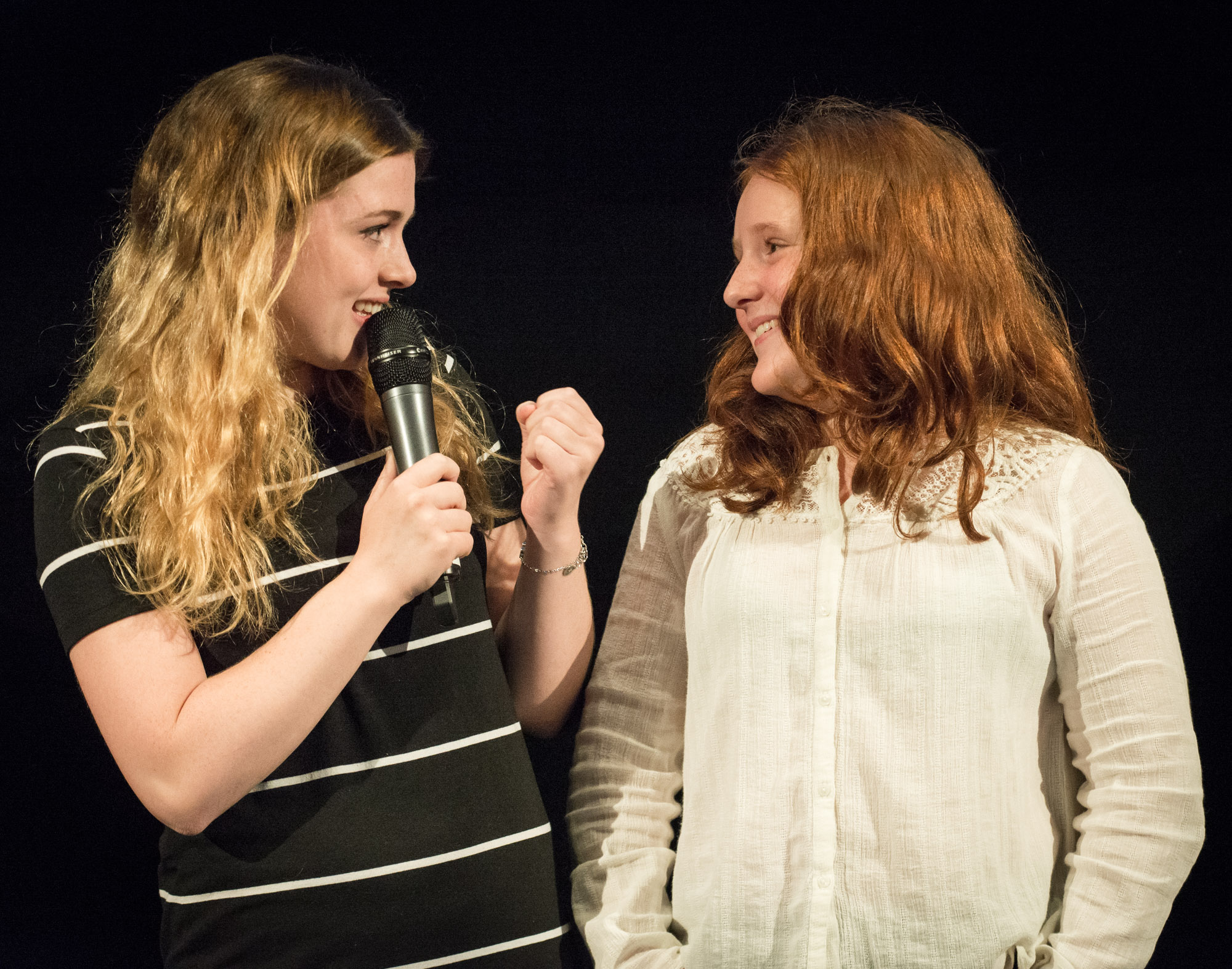 Amy Diamond och Rebecka Josephson under presentationen av den Svenska filmhösten i Filmhuset i Stockholm den 17 augusti 2015.